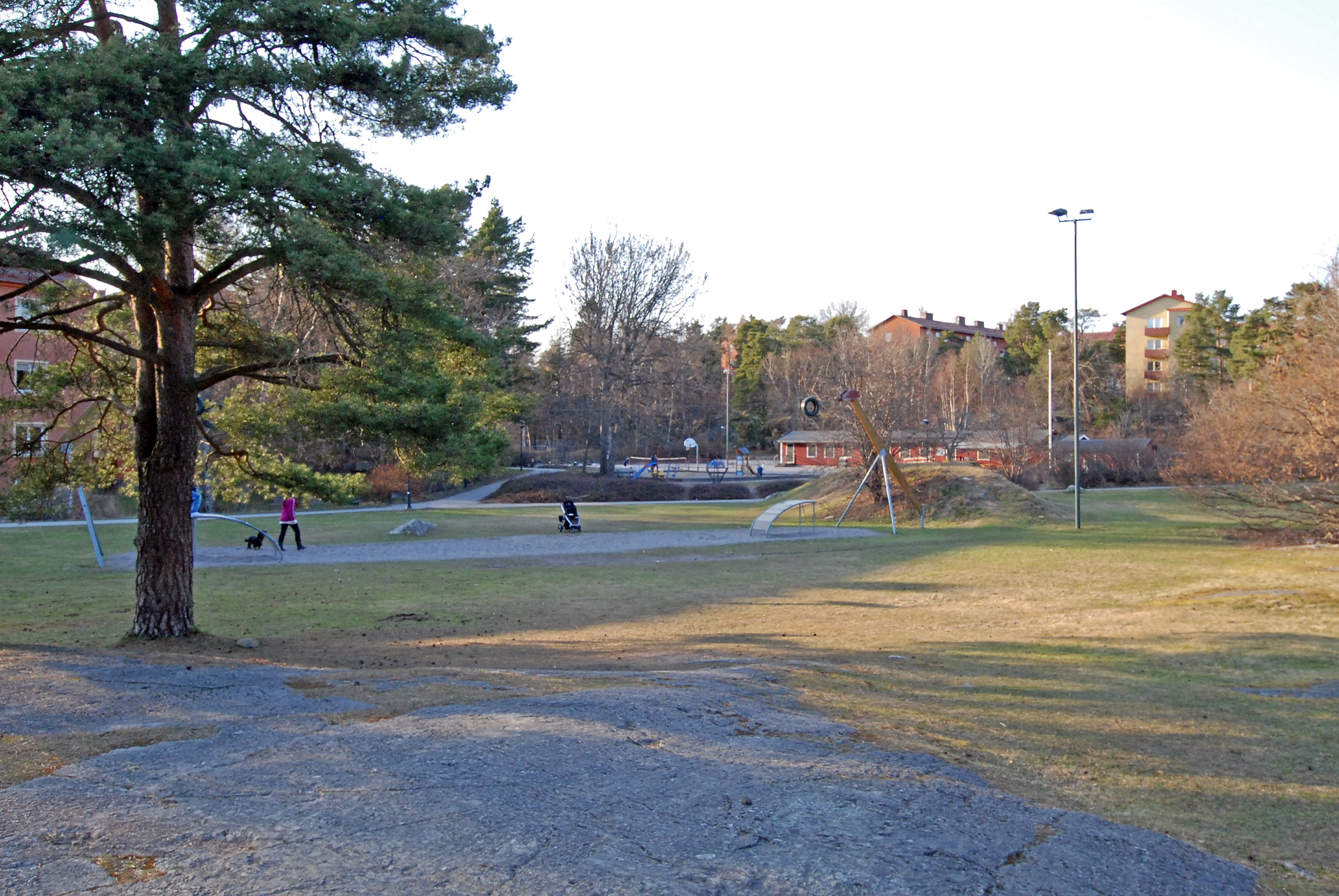 Gubbängsparken, Stockholm